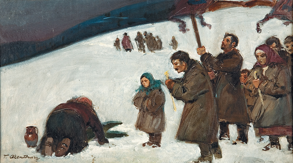 Teodor Axentowicz Orthodox Epiphany